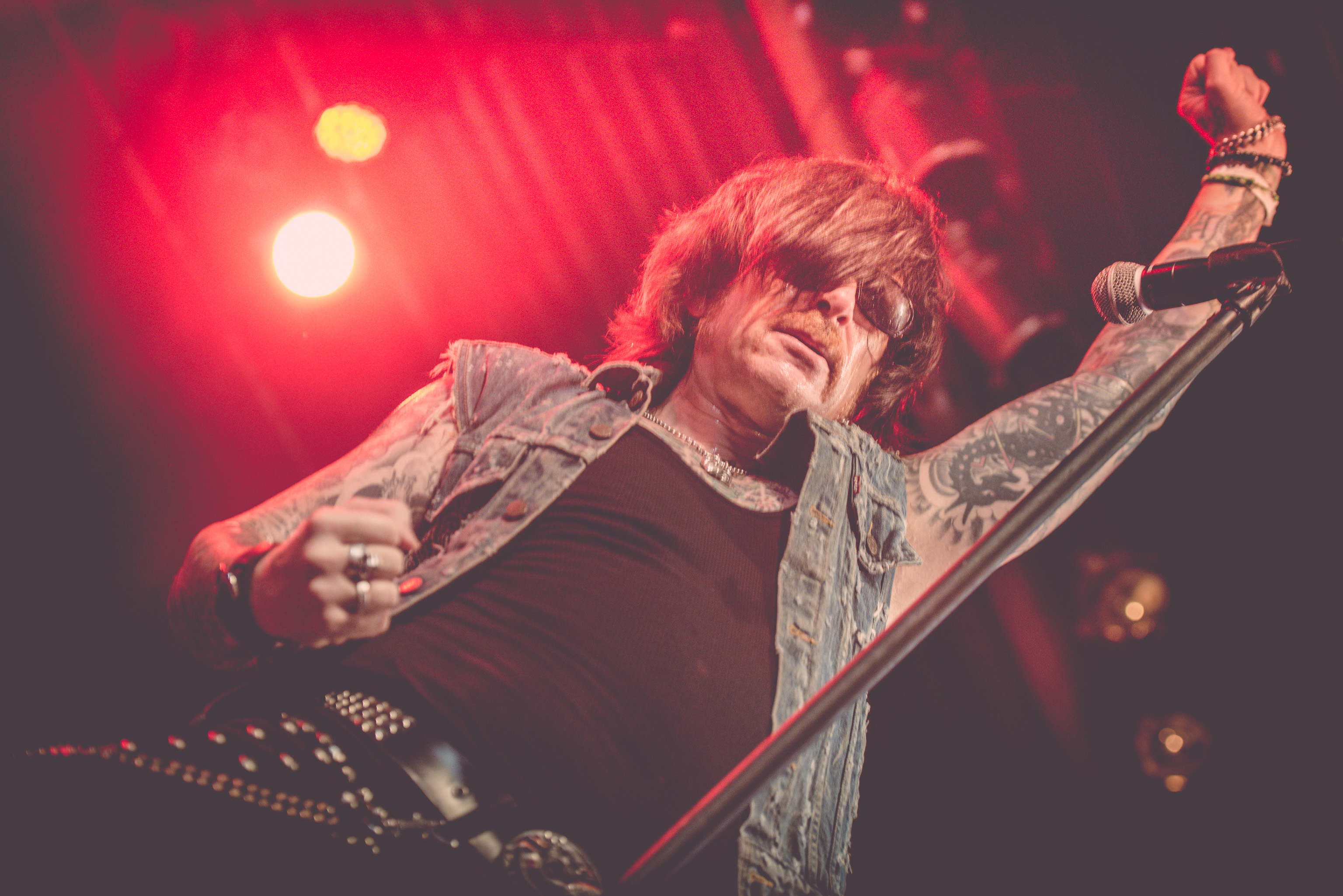 de